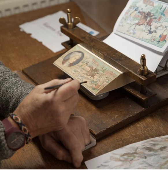 Den engelske snittmaleren Martin Frost, England, i arbeid